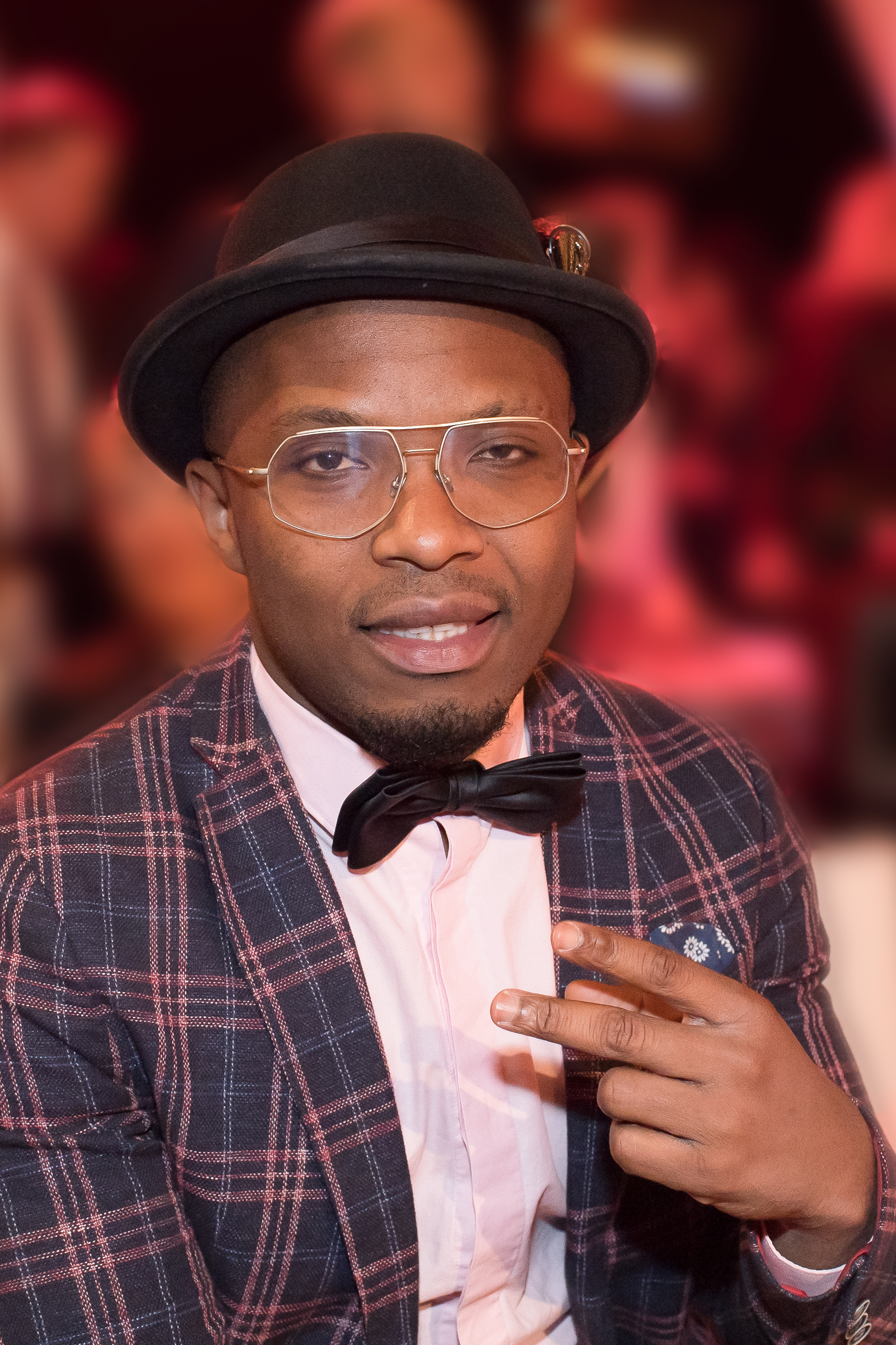 Wien, 12. April 2019: ORF Dancing Stars, 5. Folge. Bild zeigt Soso Mugiraneza.